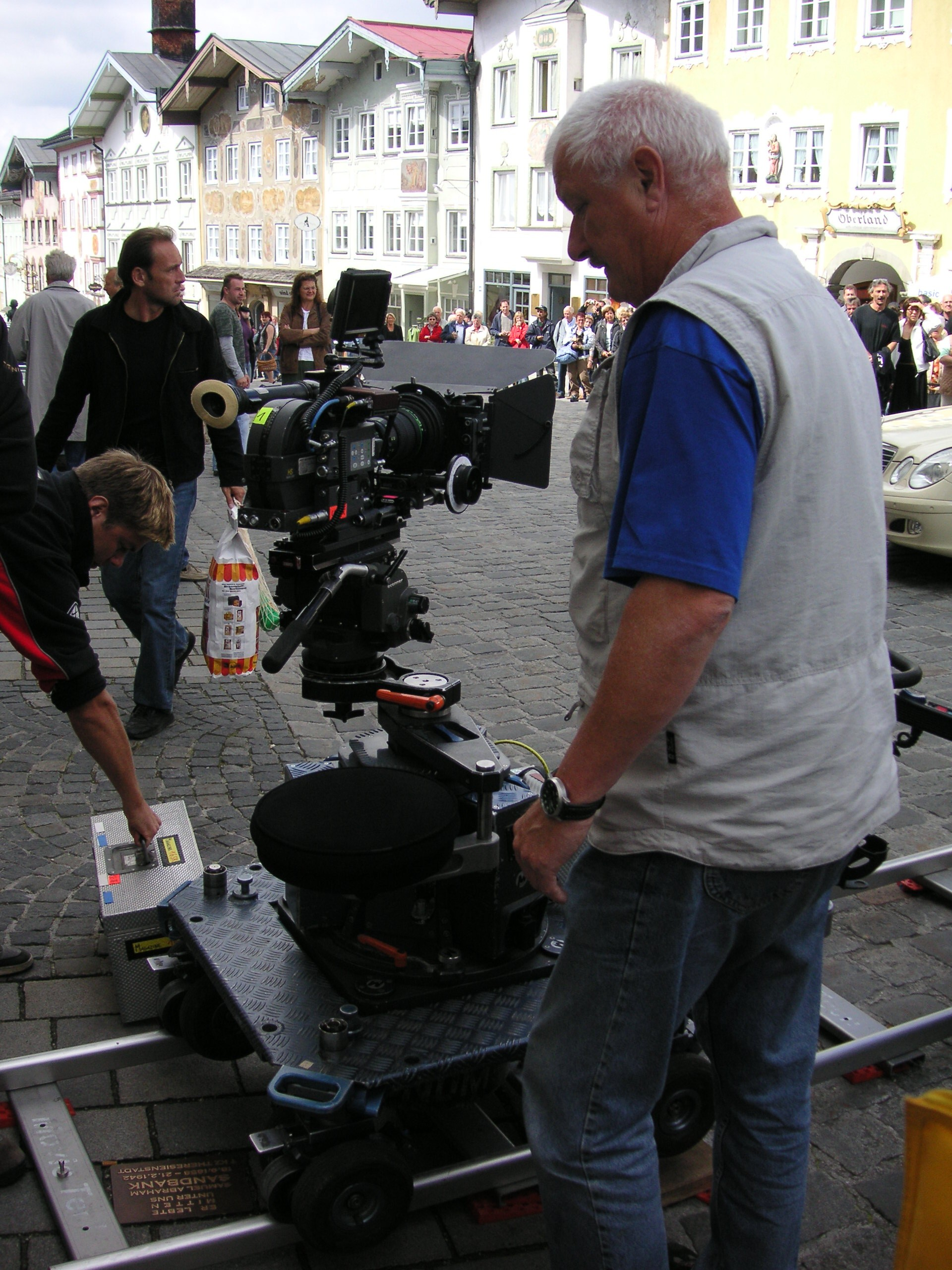 Dreharbeiten für "Der Bulle von Tölz" auf der Marktstrasse in Bad Tölz, September 2006